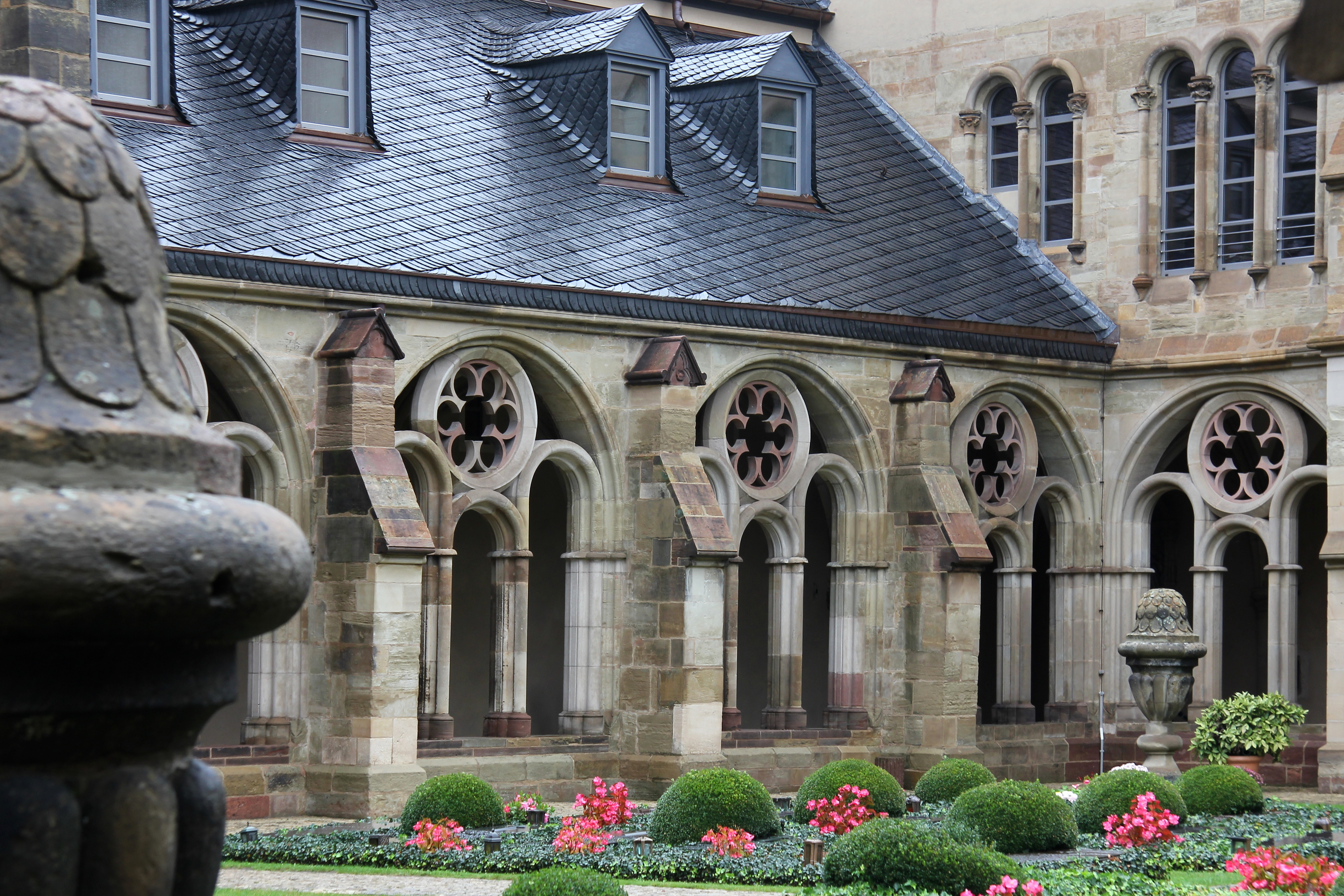 Trierer Dom, Kreuzgang; Trier, Rheinland-Pfalz (nach der Restaurierung 2014)